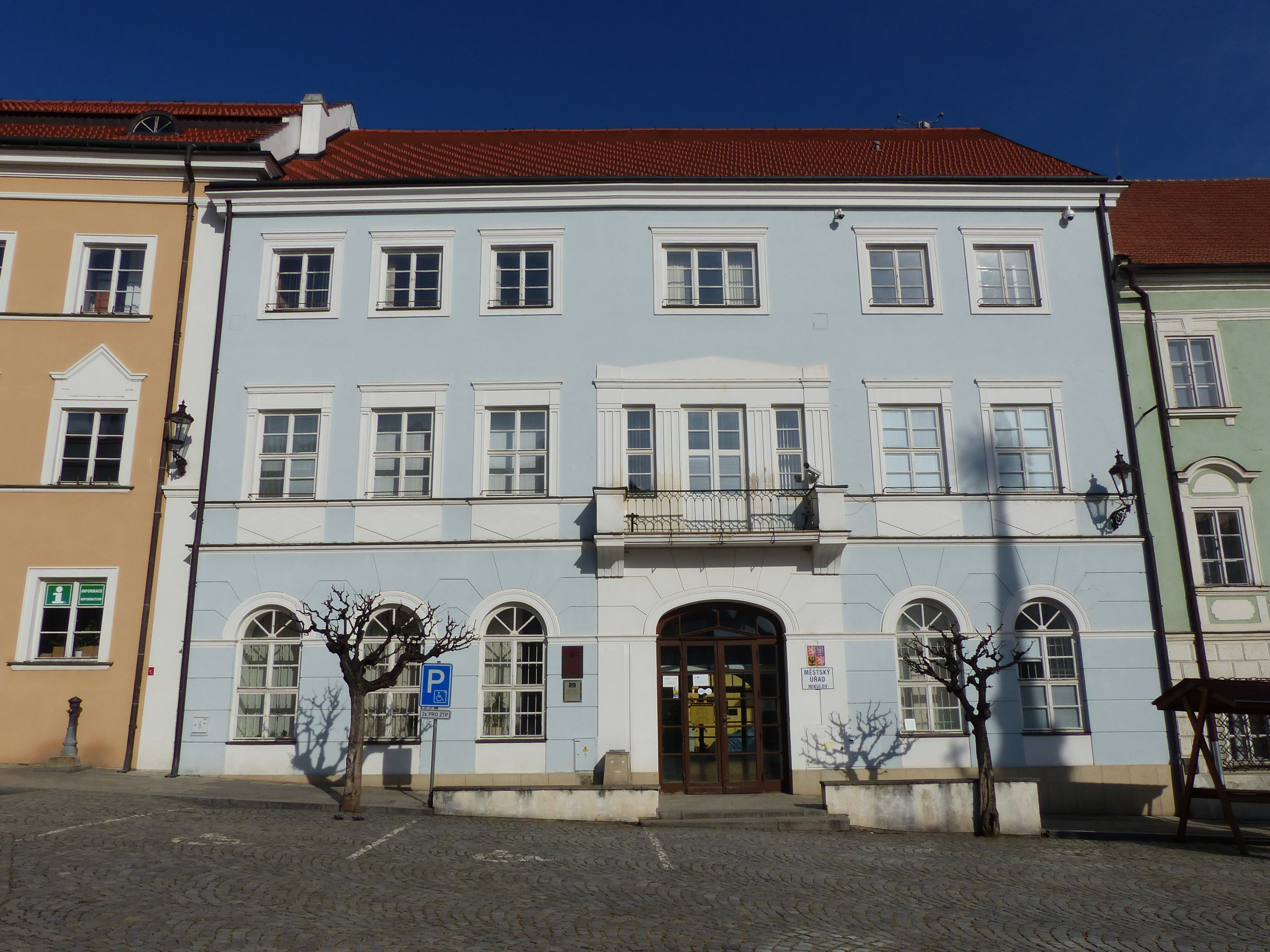 Rathaus von Mikulov